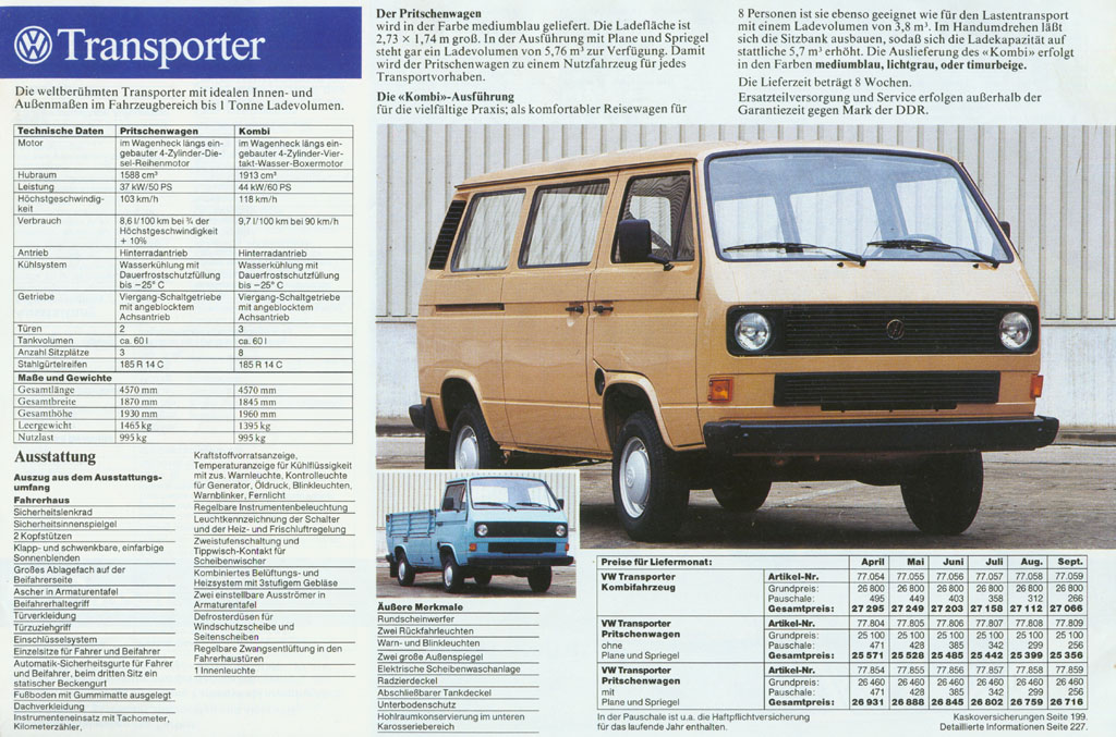 Foto aus dem Katalog der Genex.